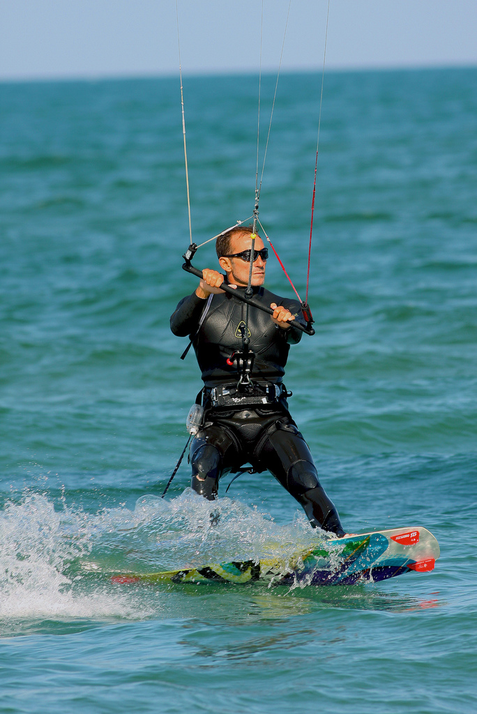 Radu Mazare